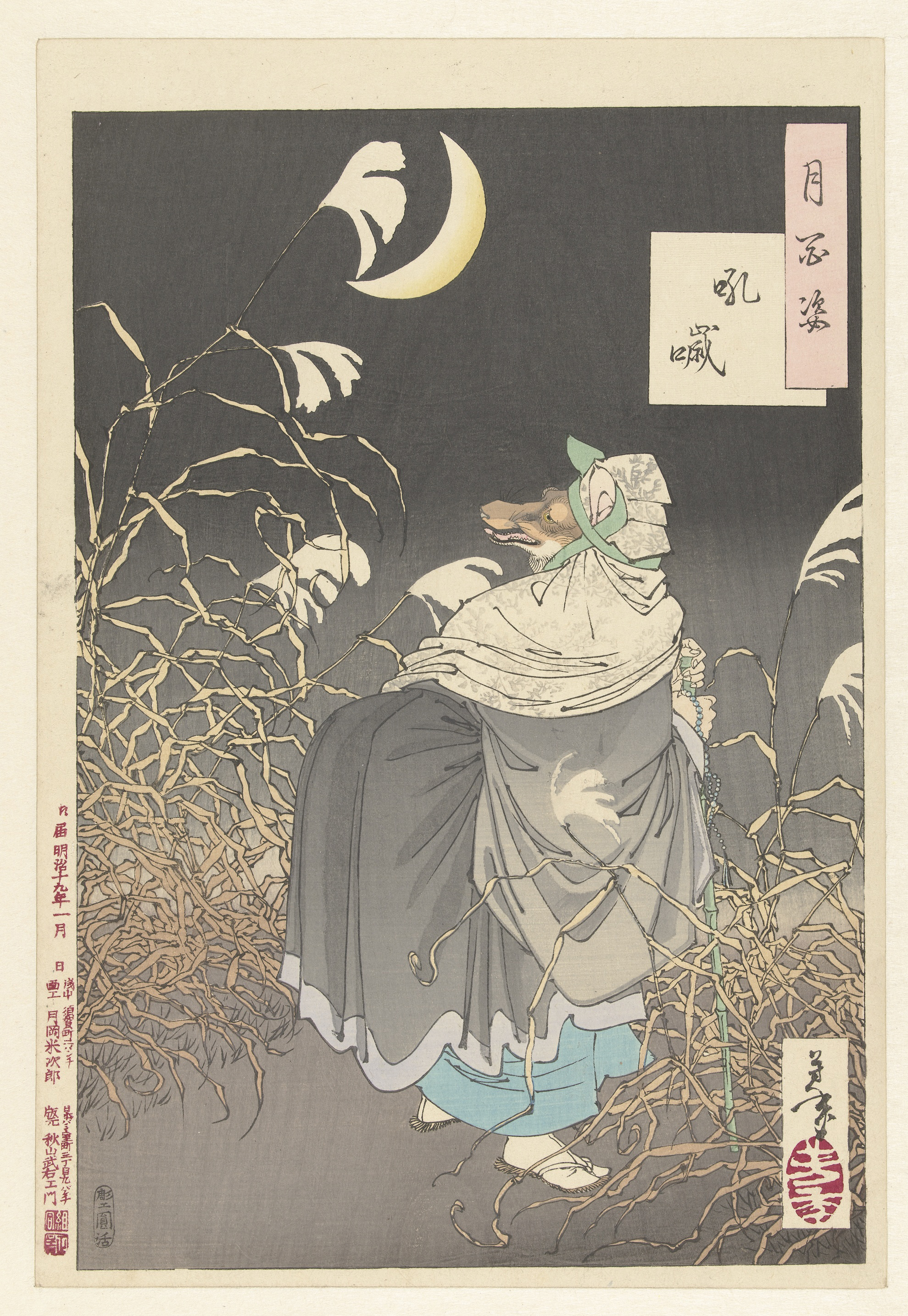 Vos, vermomd als de priester Hakuzosu met wandelstok en rozenkrans, tussen riet, bij sikkelmaan. De vos is halverwege een gedaanteverwisseling tussen vos (kop, oren en gebolde kleding door de staart) en mens (handen). Label Line: mentioned on object Tsukioka Yoshitoshi (1839 - 1892), 1886, kleurenhoutsnede; lijnblok in zwart met kleurblokken; blinddruk Collection: prenten; Japan (collectie)